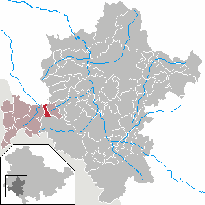 Aschenhausen in Thuringia - District Schmalkalden-Meiningen